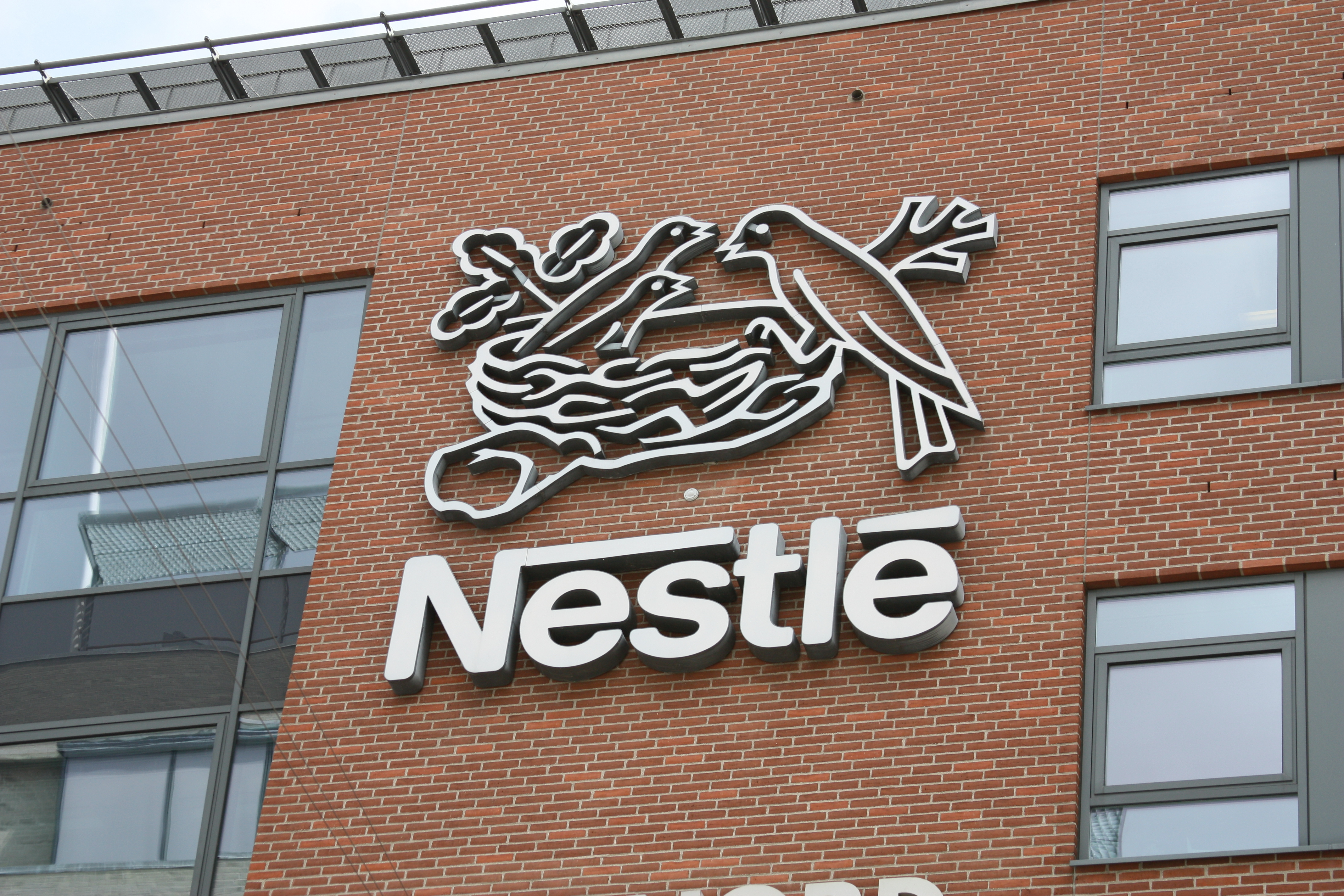 Kopenhagen 2009